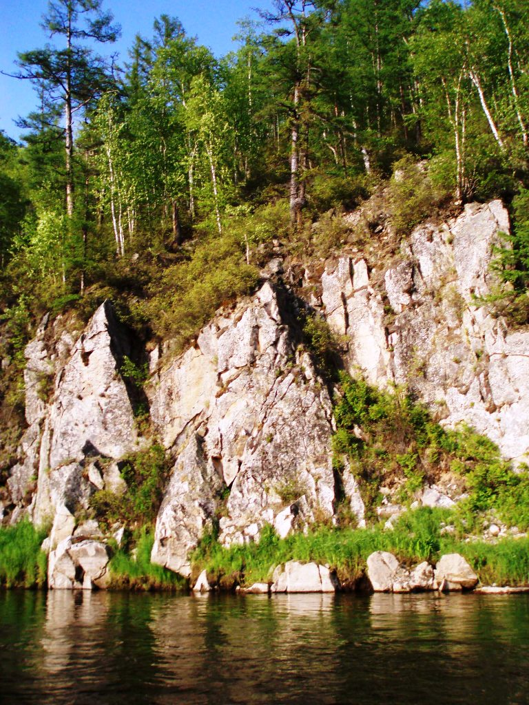 Тумнин